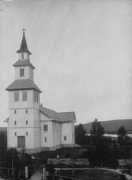 Kyrkan från sydväst. Försvann i brand 1983. Kategori: (01) ExteriörerKyrkan från sydväst. Försvann i brand 1983.